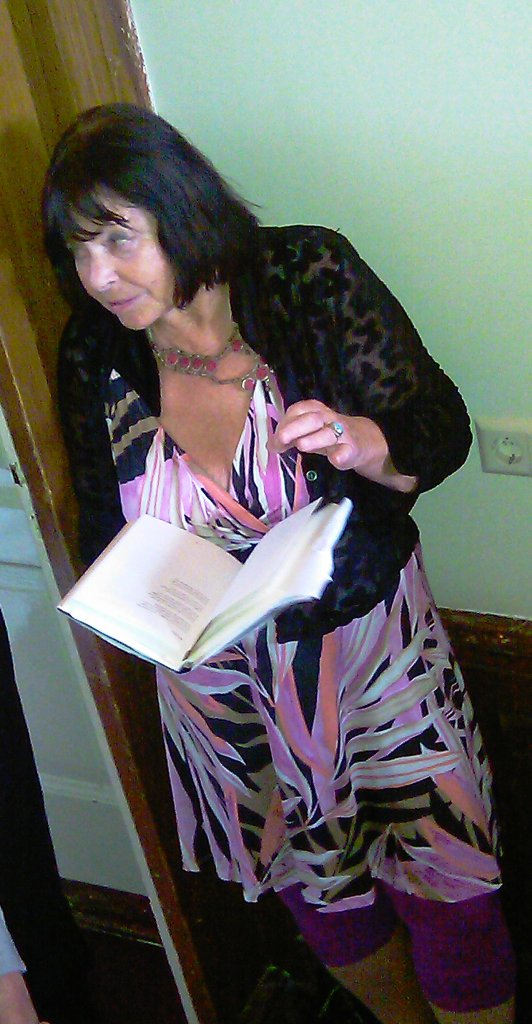 Optreden van Jana Beranová in het oudste woonhuis van Rotterdam, aan de Rechter Rottekade